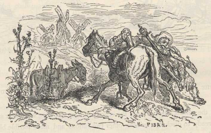 "Sancho Pança ajuda Dom Quixote a montar no Rocinante" (1863), iIustração por Gustave Doré para “Don Quixote“ de Miguel de Cervantes.